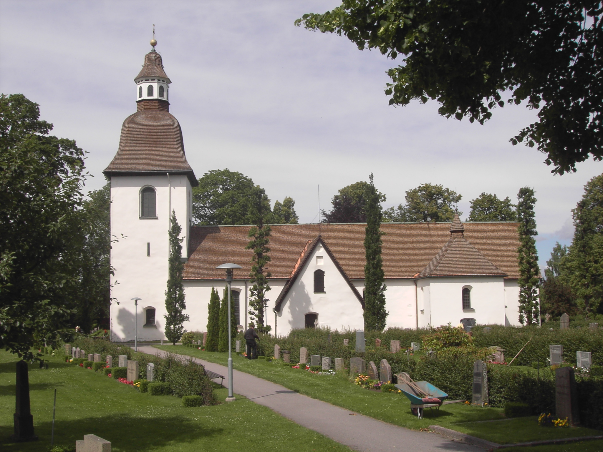 Östra Eneby kyrka outside Norrköping, Sweden